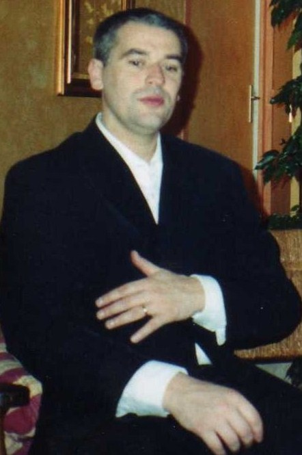 Philippe Hervé (ancien joueur de basket-ball, actuel entraineur de haut niveau : Elan Chalon, ASVEL, Orléans)